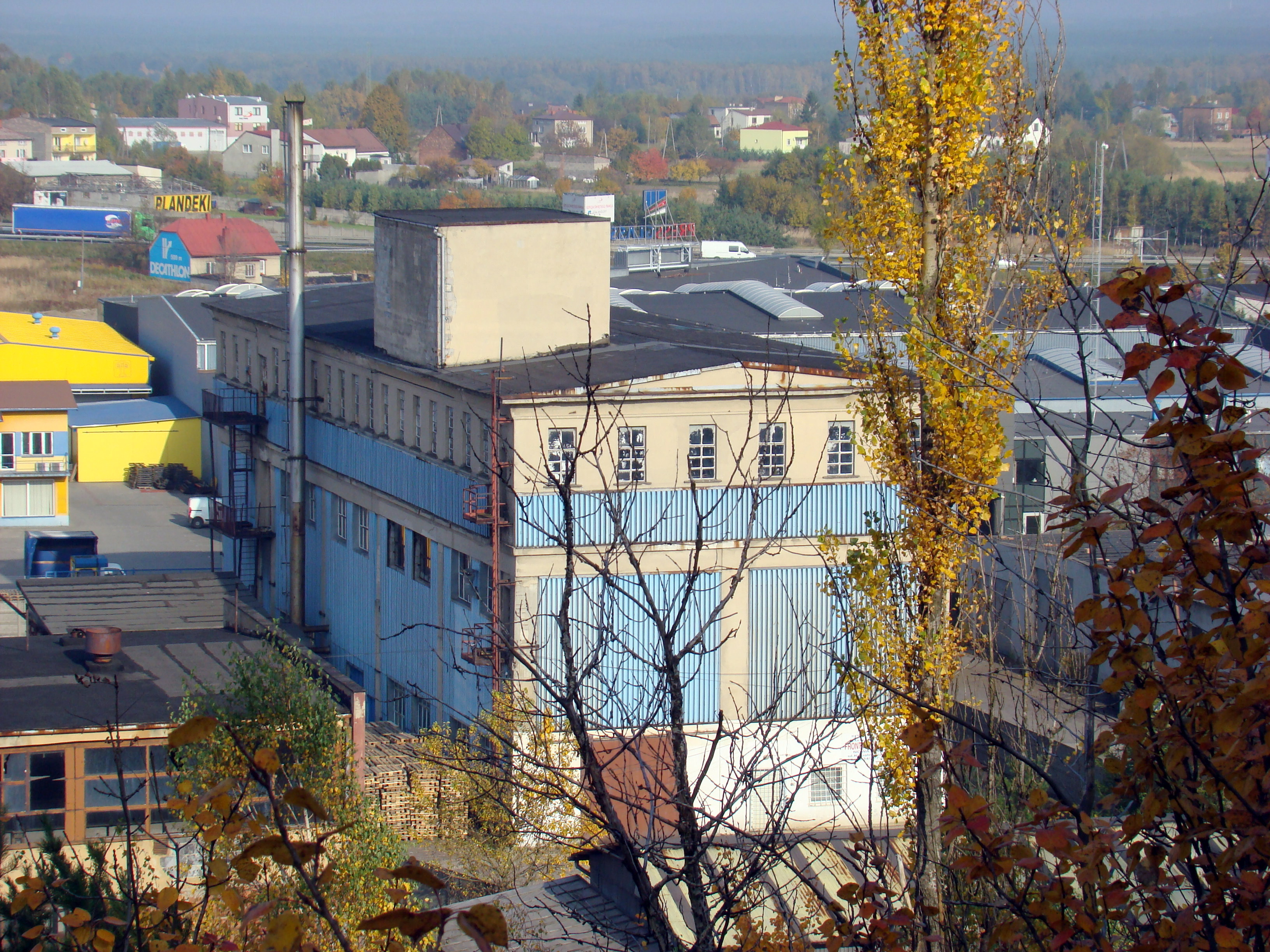 Szyb dawnej kopalni rud żelaza "Tadeusz II" w Nowej Wsi, obecnie zakład meblarski.